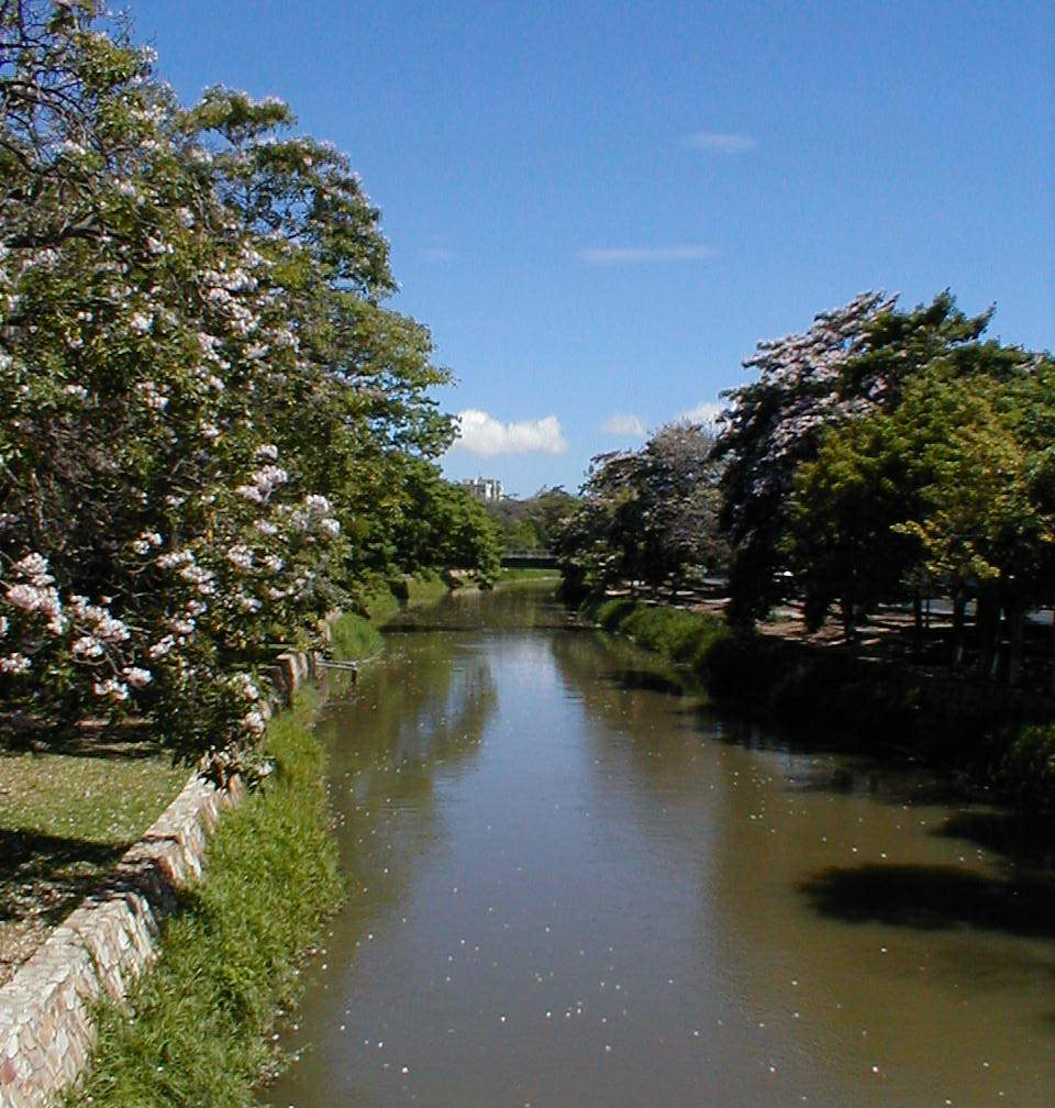 Rio manzanares Cumana edo Sucre Venezuela